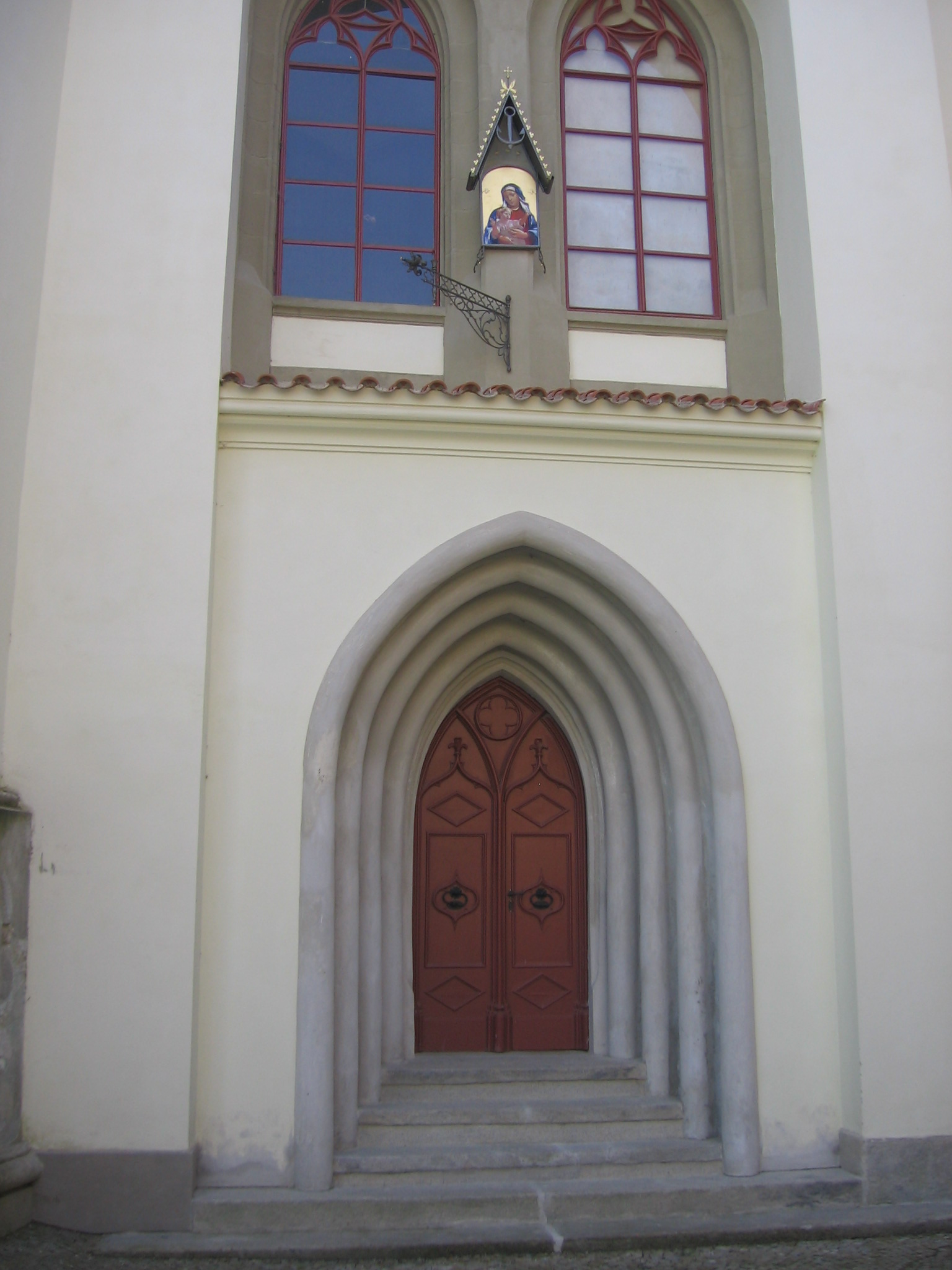 Zámek Bor u Tachova, vstupní brána.